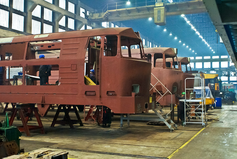 Lokomotywy spalinowe ST45-04, 03 i 02 podczas modernizacji w zakładach Pesa Bydgoszcz.